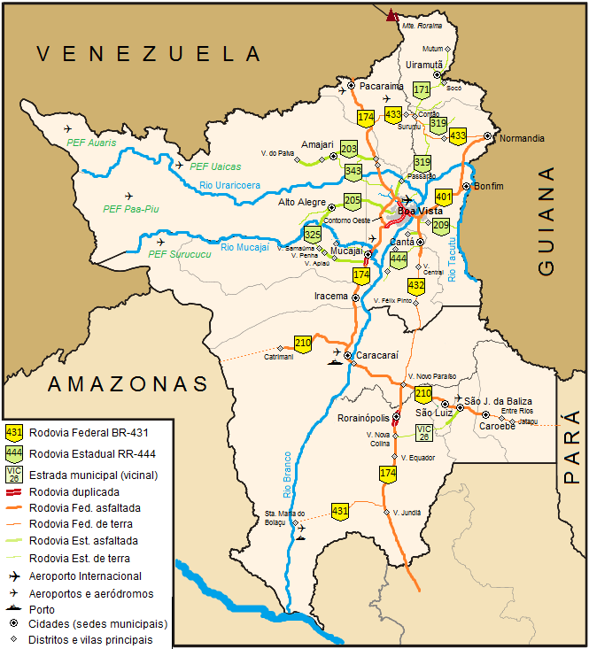 Mapa Rodoviário do Estado de Roraima, Brasil. Esse mapa foi feito derivando-se a imagem livre image:Roraima_MesoMicroMunicip.svg